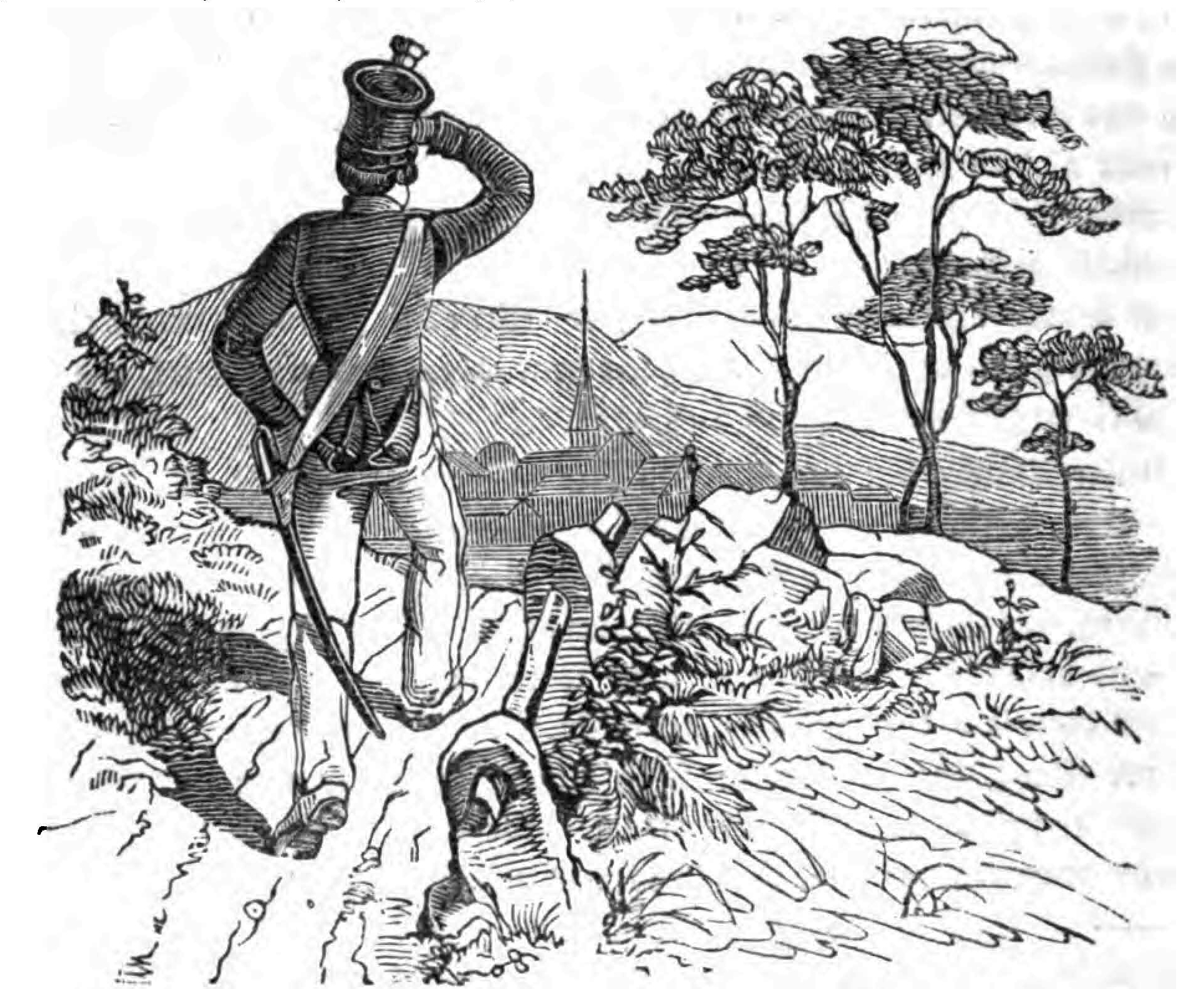 Berthold Auerbach, Schwarzwälder Dorfgeschichten, Der Tolpatsch, Zeichnung von Mathias Artaria, 1848. – Aloys Schorer, Rekrut auf Urlaub, blickt auf sein Heimatdorf hinab: „Er stand ruhig und fest und machte seinem Geburtsorte den militärischen Gruß.“